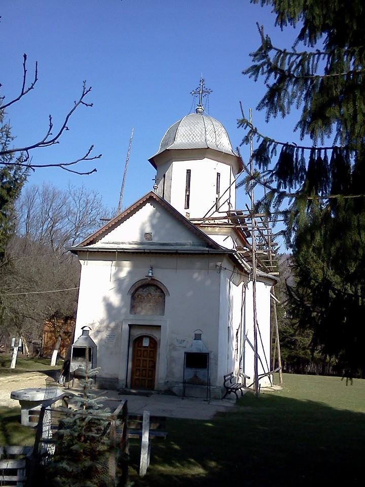 Biserica „Sf. Treime” a fostului schit Lespezi